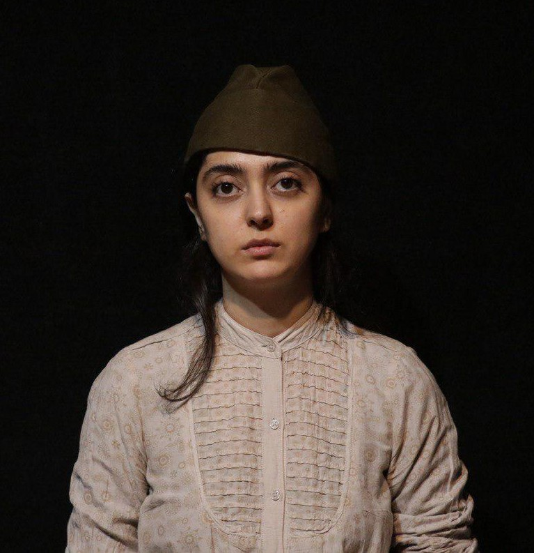 ندا ناجی در نقش والنتینا آنارشیست روس فراری از جوخهٔ اعدام در تئاتر مستند اما گلدمن